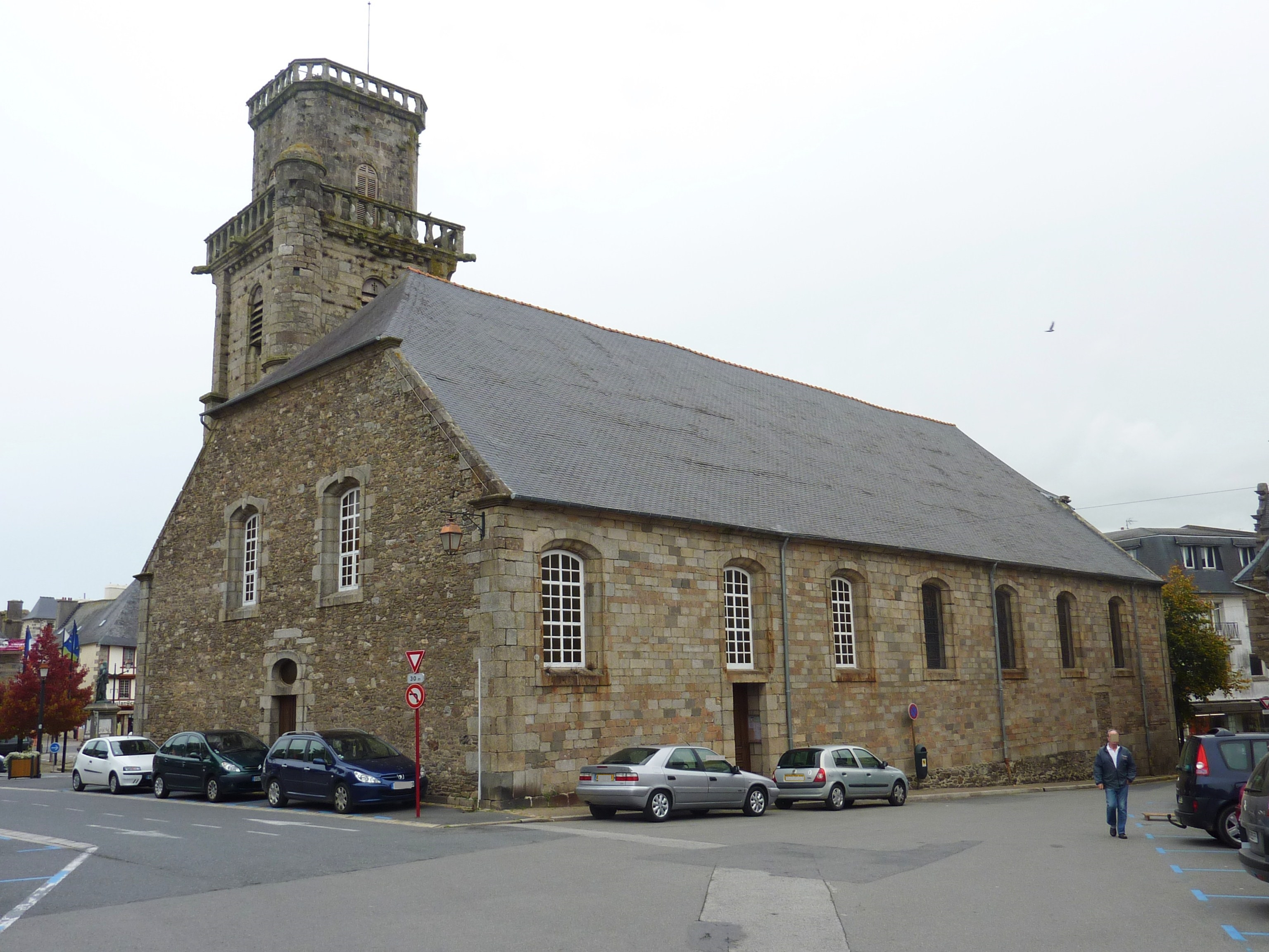 Lesneven : l'église paroissiale Saint-Michel